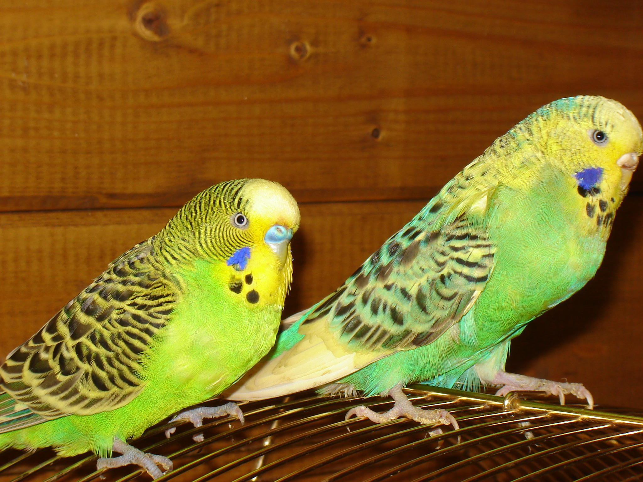 Zelfgemaakte foto. Grasparkieten (Melopsittacus undulatus). Boven op kooi in tuinhuis.